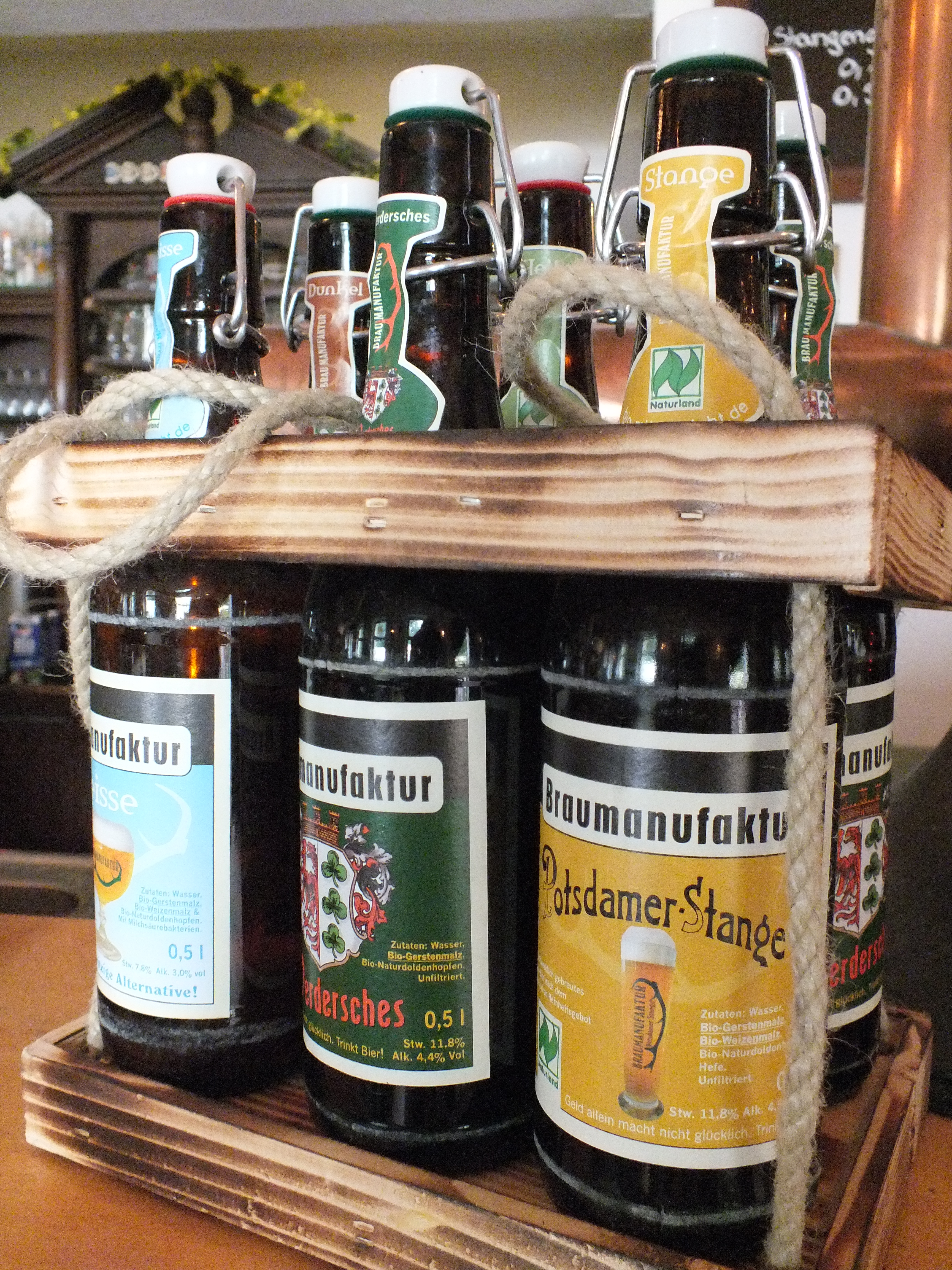 Brauereimanufaktur ‚Forsthaus Templin’, Produktauswahl